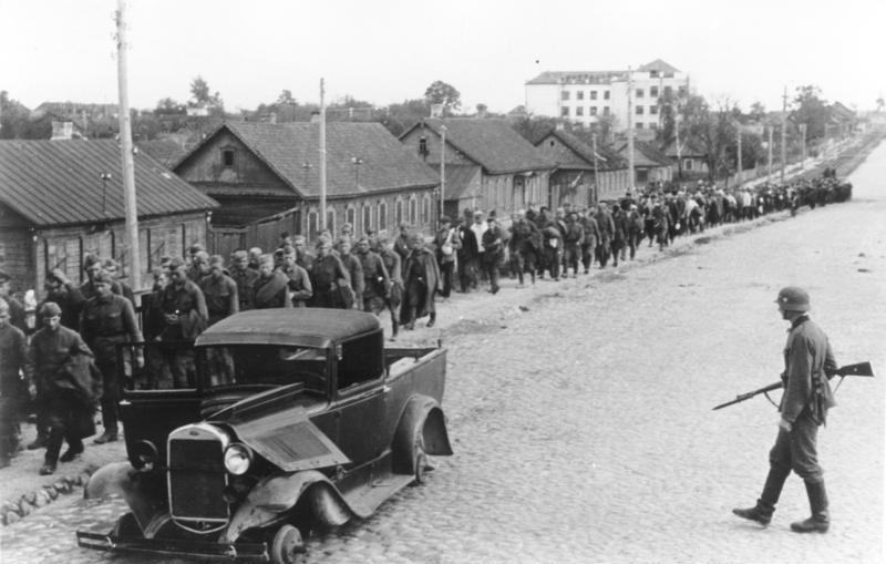 Minsk, 2.7.41 Gefangene russische Soldaten